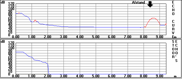 Beeld stoorecho van een vat Screenshot die ik zelf gemaakt heb, het merk van de sensor is weggelaten